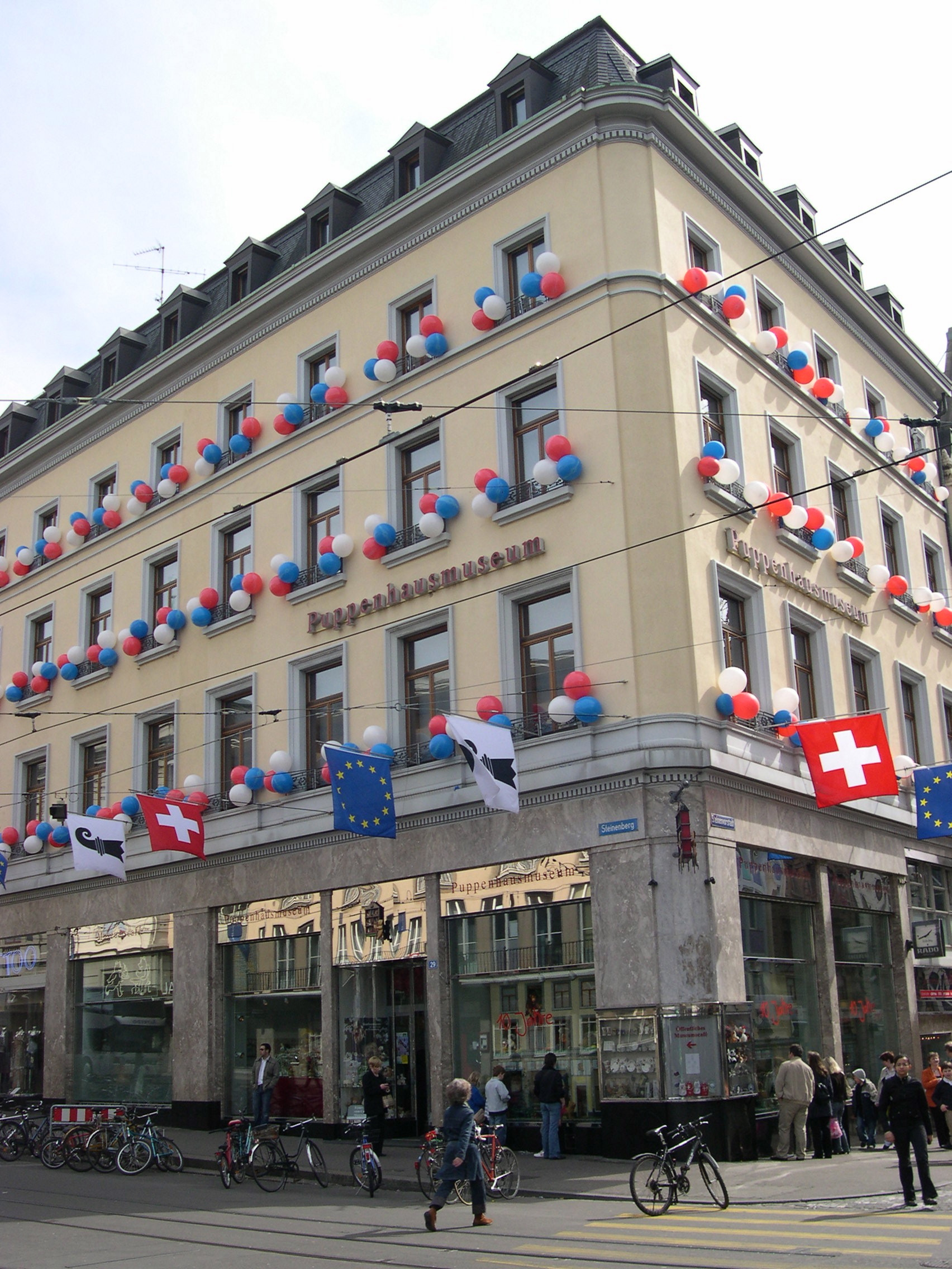 Puppenhausmuseum, Basel